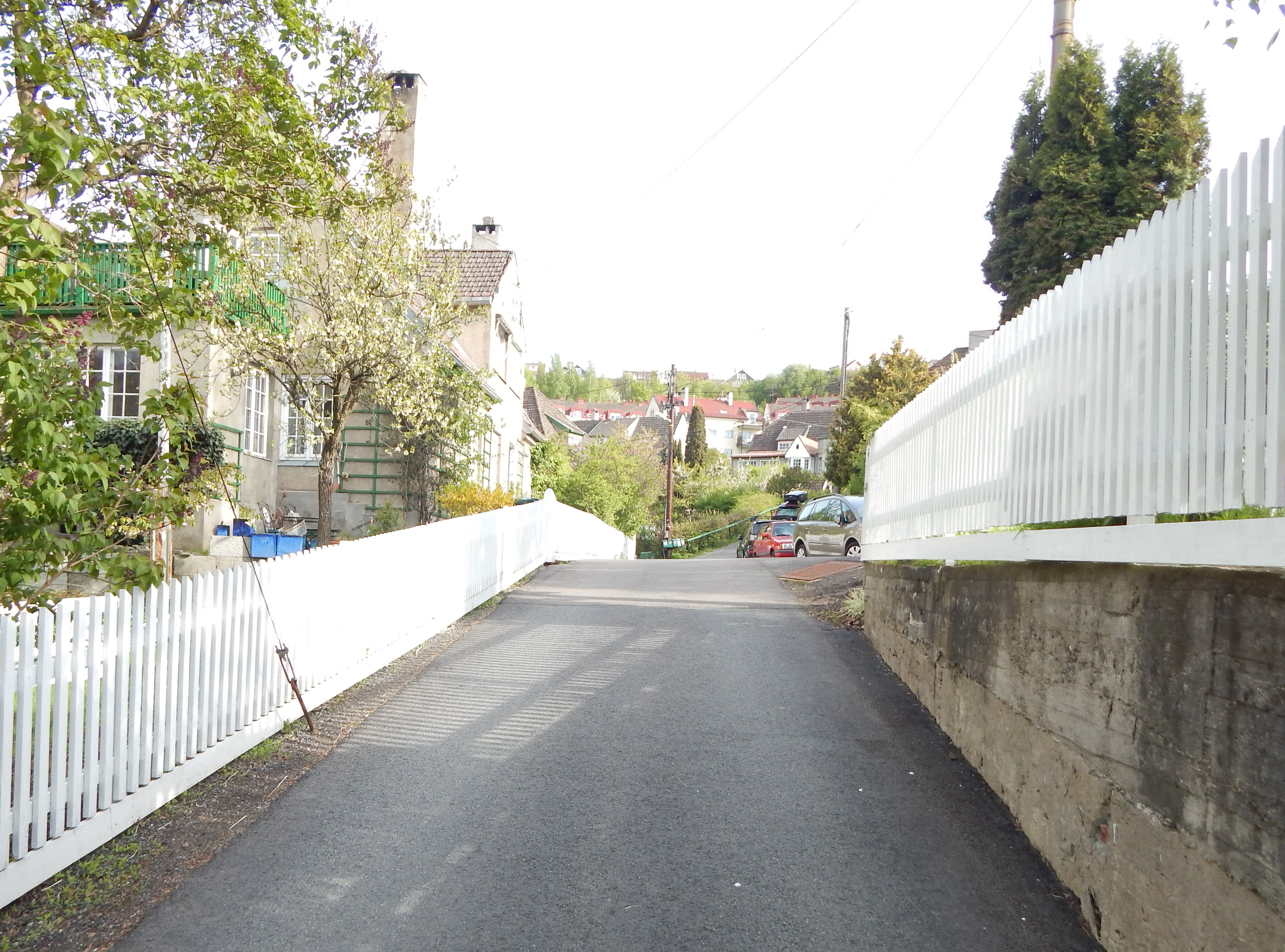 Egnehjemveien i Ekebergskrenten